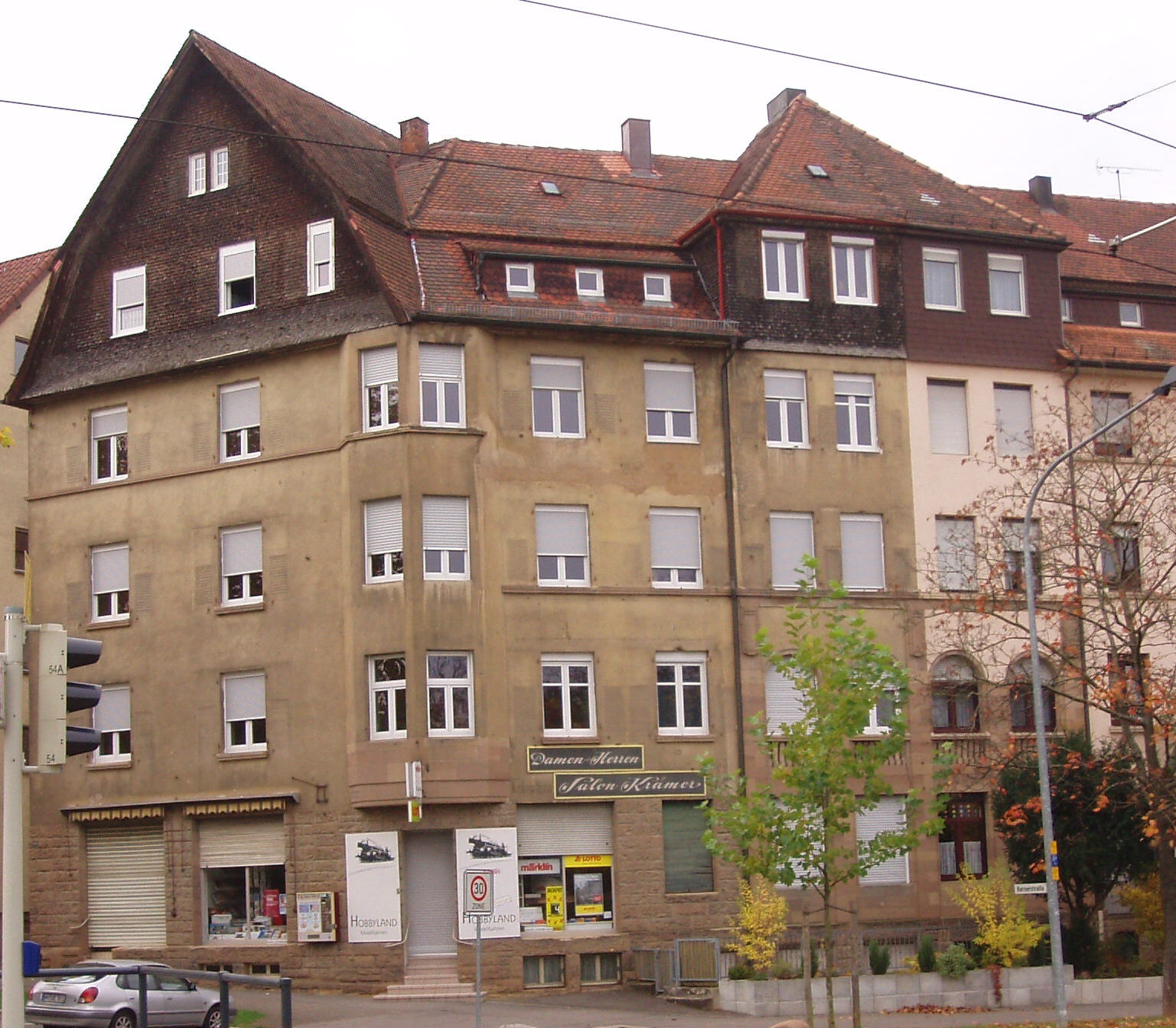 Gebäude von Beutinger und Steiner, Heilbronn, Kernerstraße 66/Ecke Moltkestraße, 1909